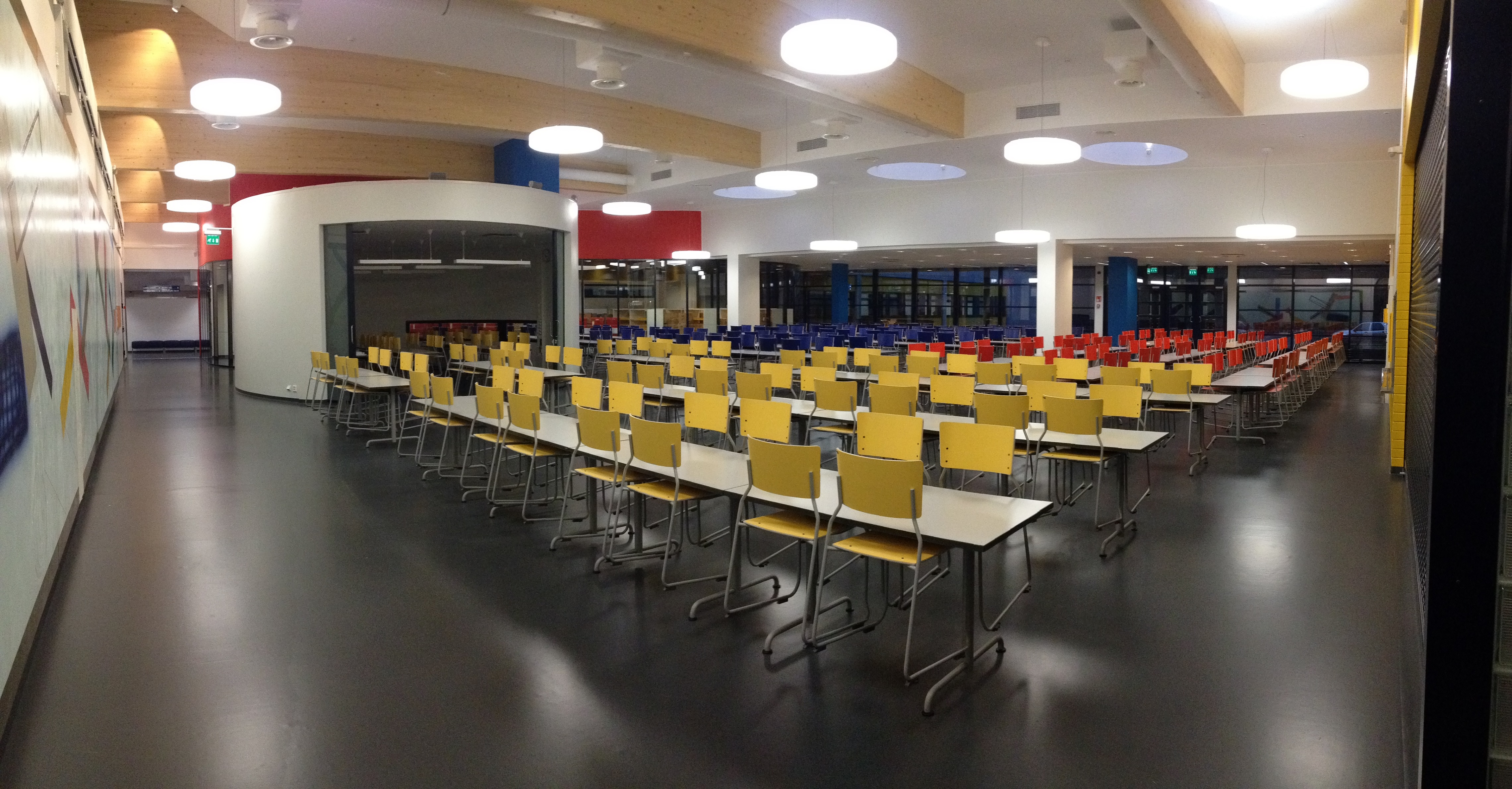 Espoonlahden lukion ruokalan kuva.